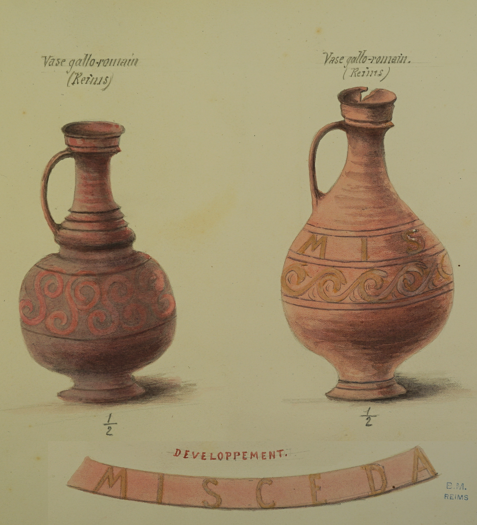 colelction Léon Morel.